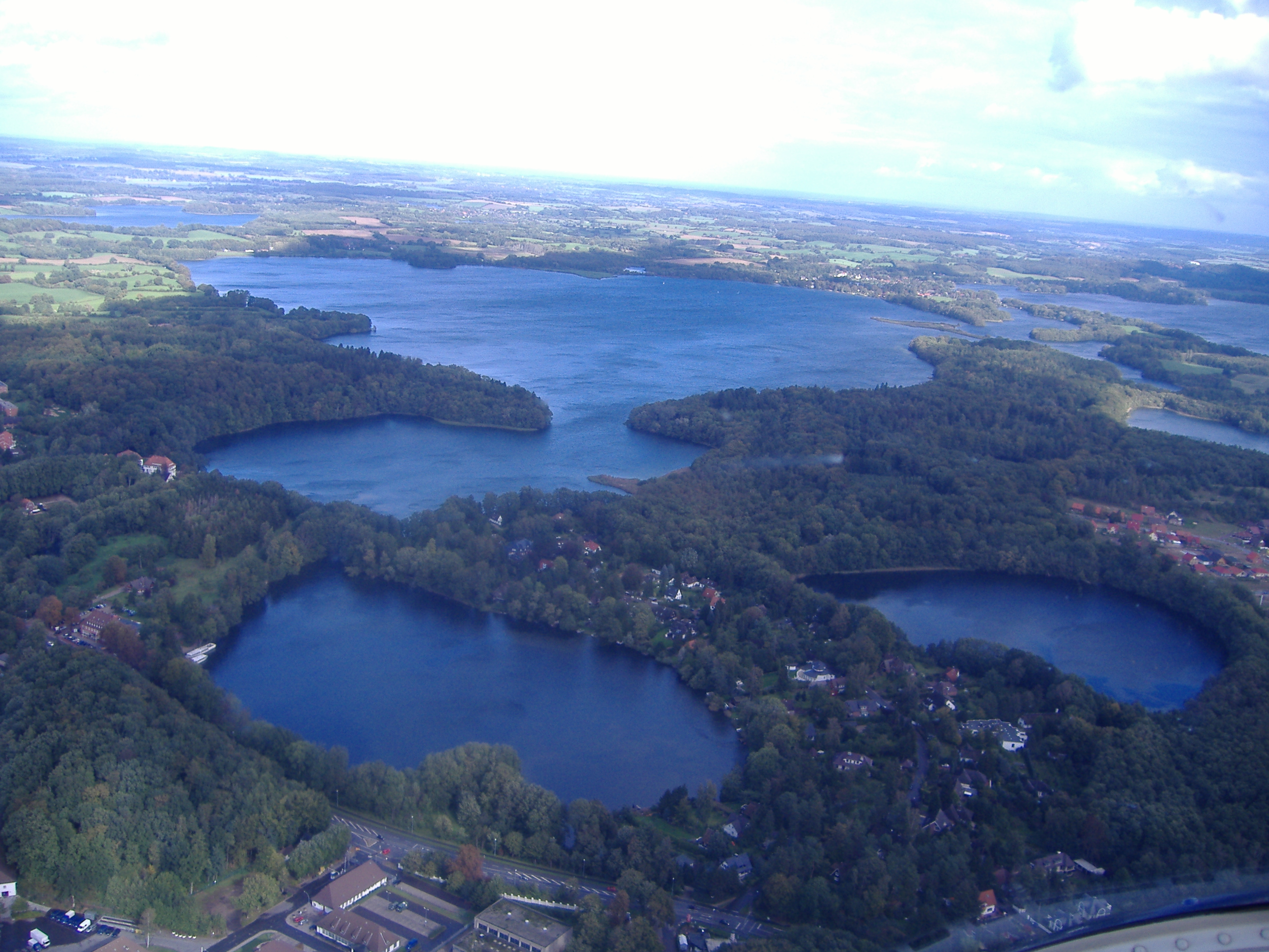 Edebergsee, Höftsee und Behler See bei Plön